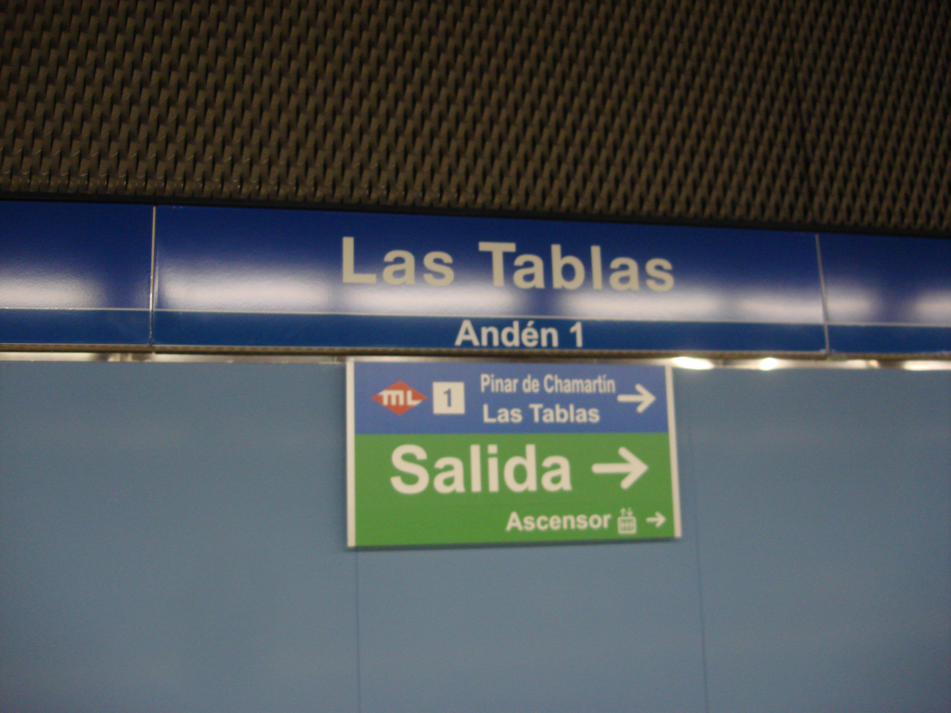 Own work